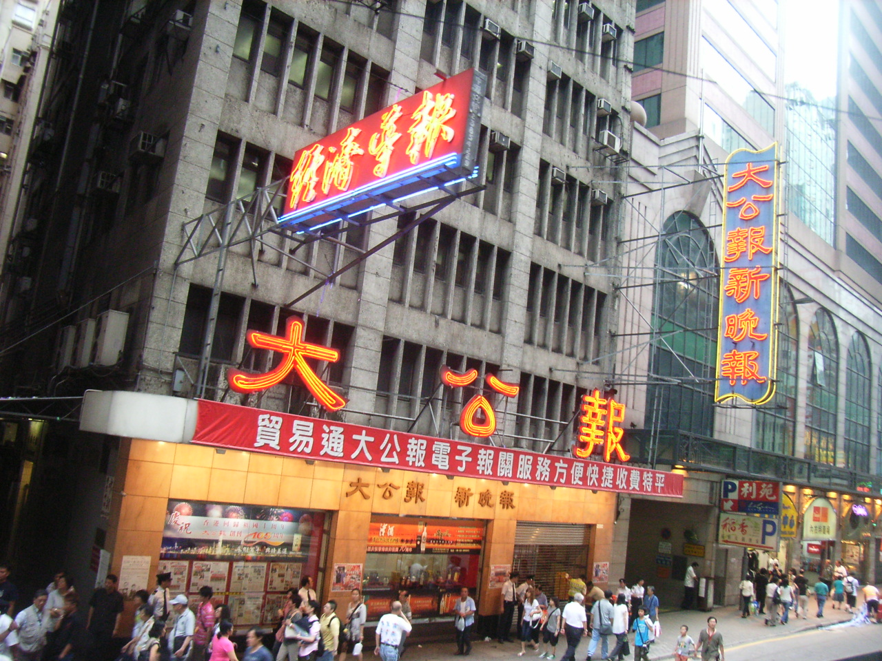 《大公報》位於香港島 灣仔區 軒尼詩道的舊址 Author= Kwanyatsw